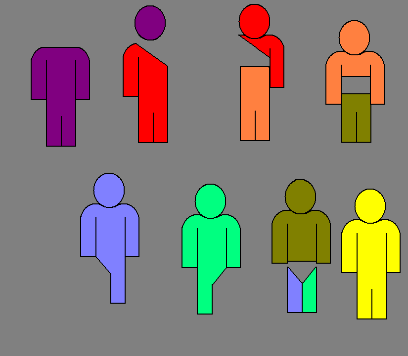 6구의 시체로 7개의 시체를 만든 모습. 노란색은 멀쩡한 사람.